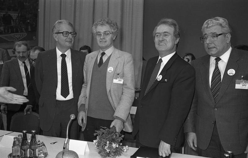 28.2.1983 SPD-Wahlkundgebung mit Kanzler-Kandidat Dr. Hans-Jochen Vogel in der Kölner Sporthalle